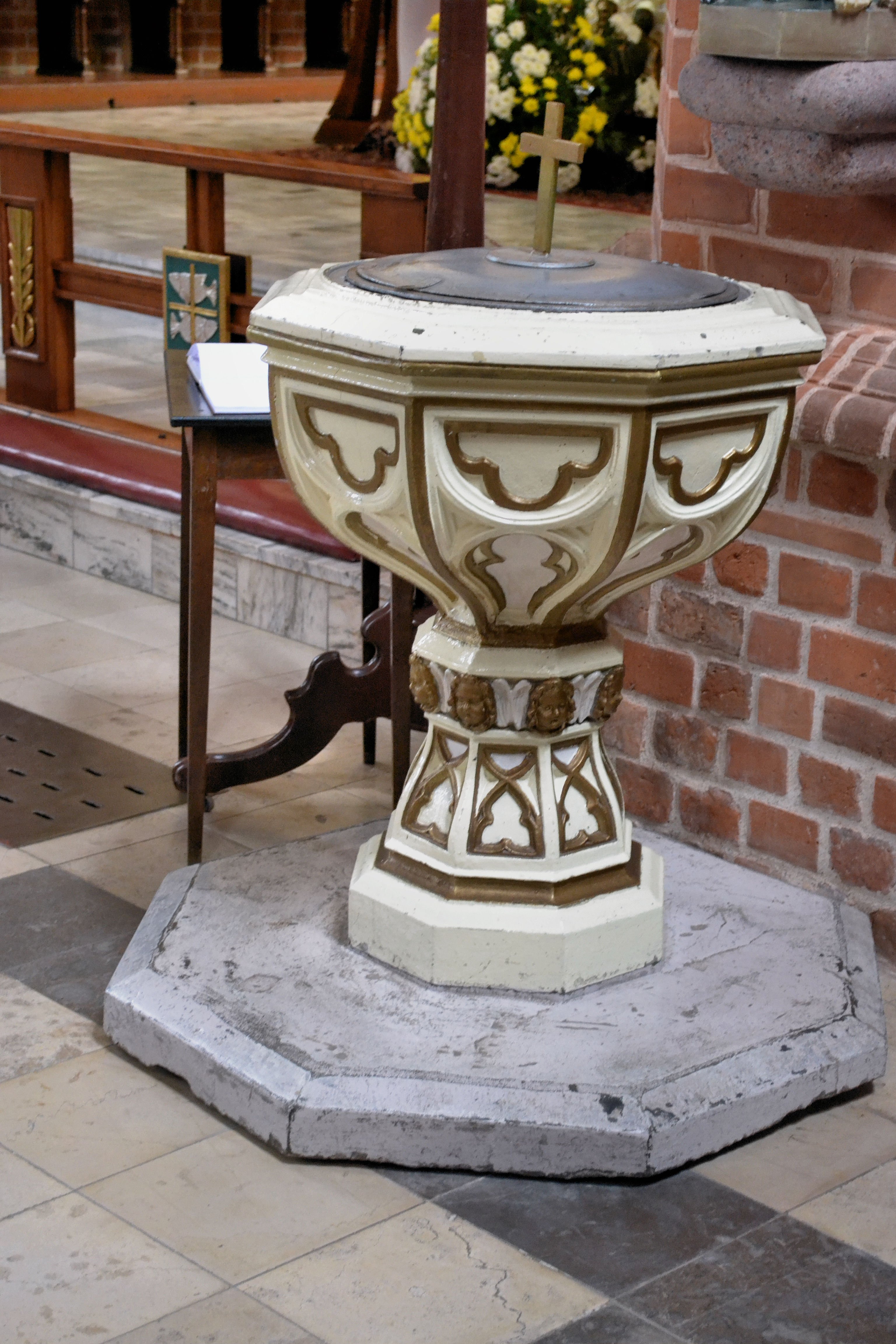 kościół Macierzyństwa NMP Trzebiatów